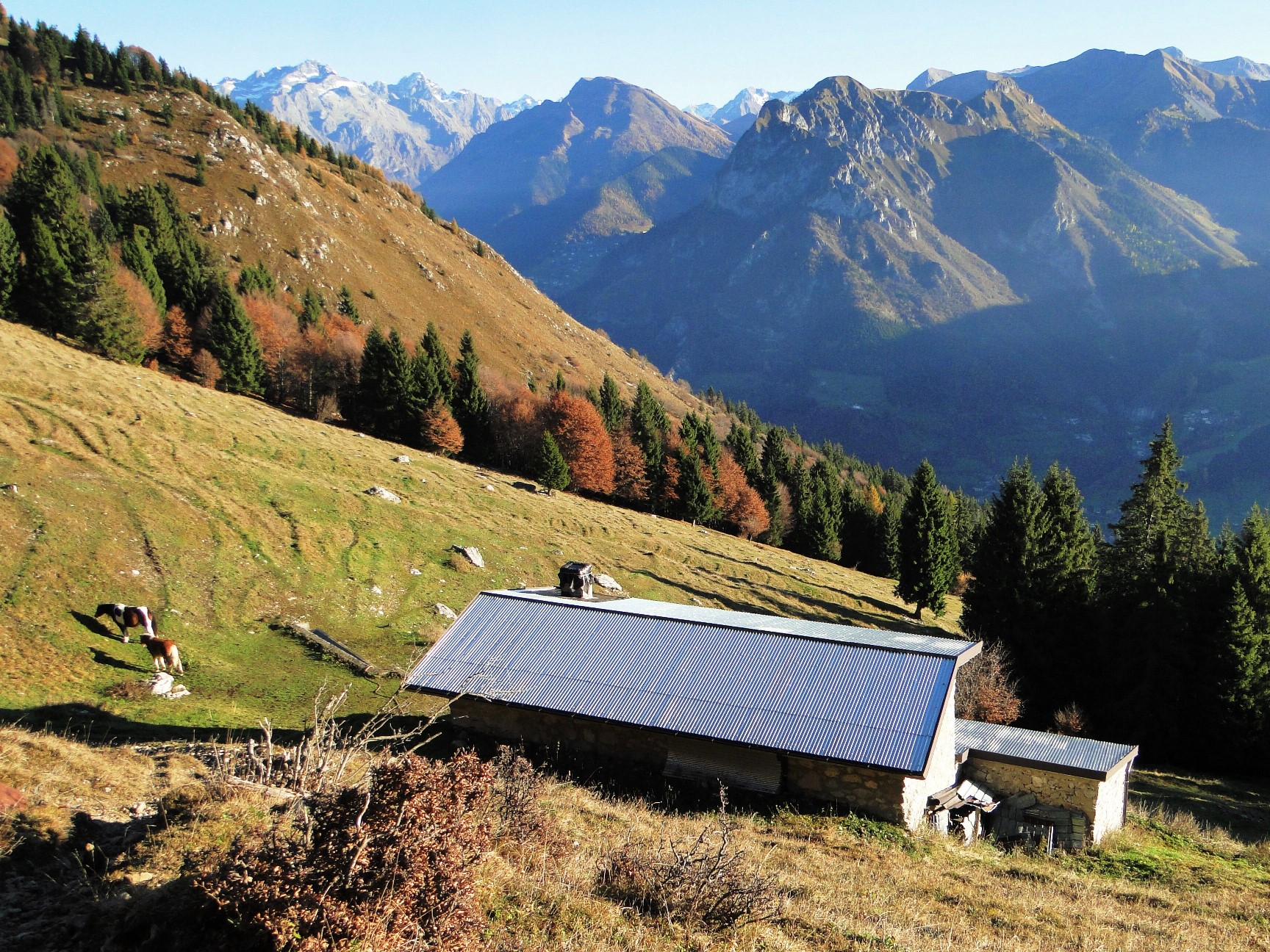 Baita inferiore di monte Secco. Prealpi bergamasche. Ardesio (BG)